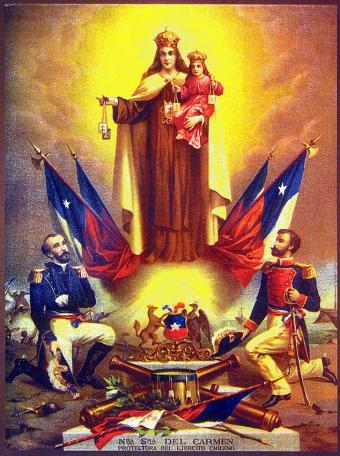 Virgen del Carmen. Su imagen es usada como patrona del Ejército Libertador de Argentina y Chile